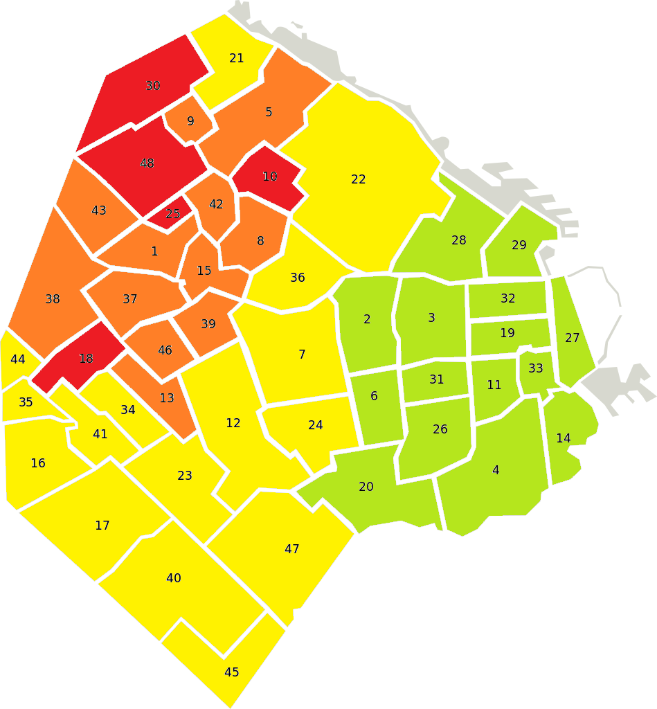 CABA Barrios Inundación de 2013